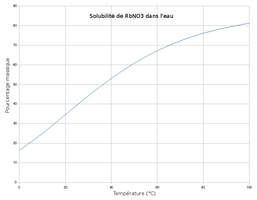 Solubilité de RbNO3 dans l'eau en fonction de la température.